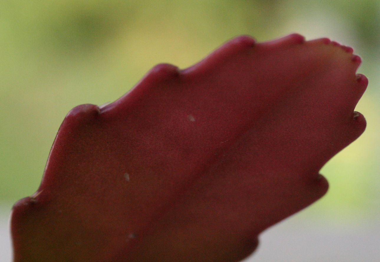 Pseudorhipsalis amazinica (Hylocereeae; Cactaceae; Planta) fiatal hajtása